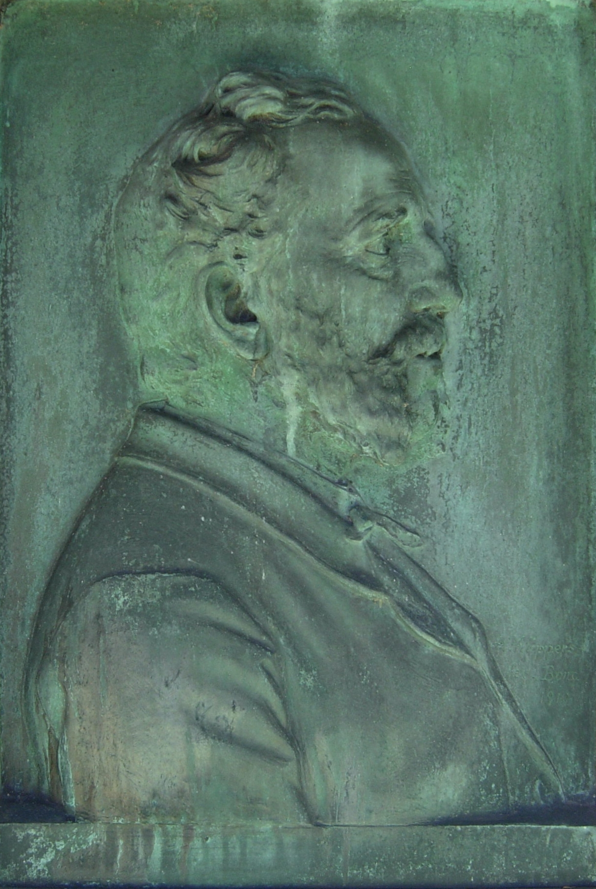 Albert Küppers: Bronze-Relief (1910) für den Kunstsammler Carl Roettgen (1837 – 1909) auf dem Alten Friedhof Bonn